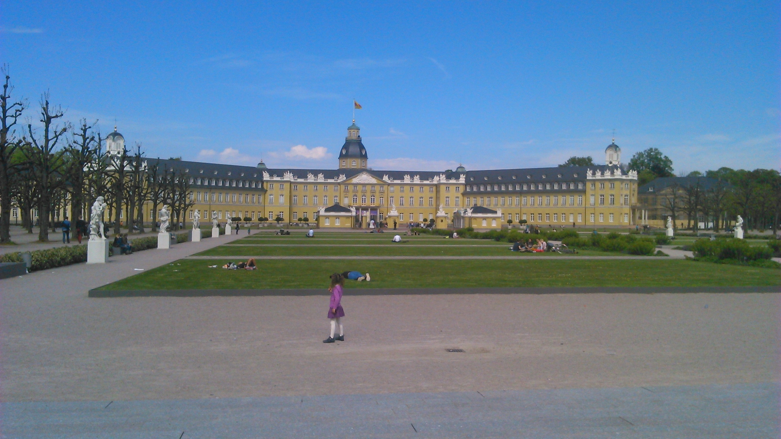 Frontansicht des Karlsruher Schlosses mit Teilen des Schlossgartens, April 2016